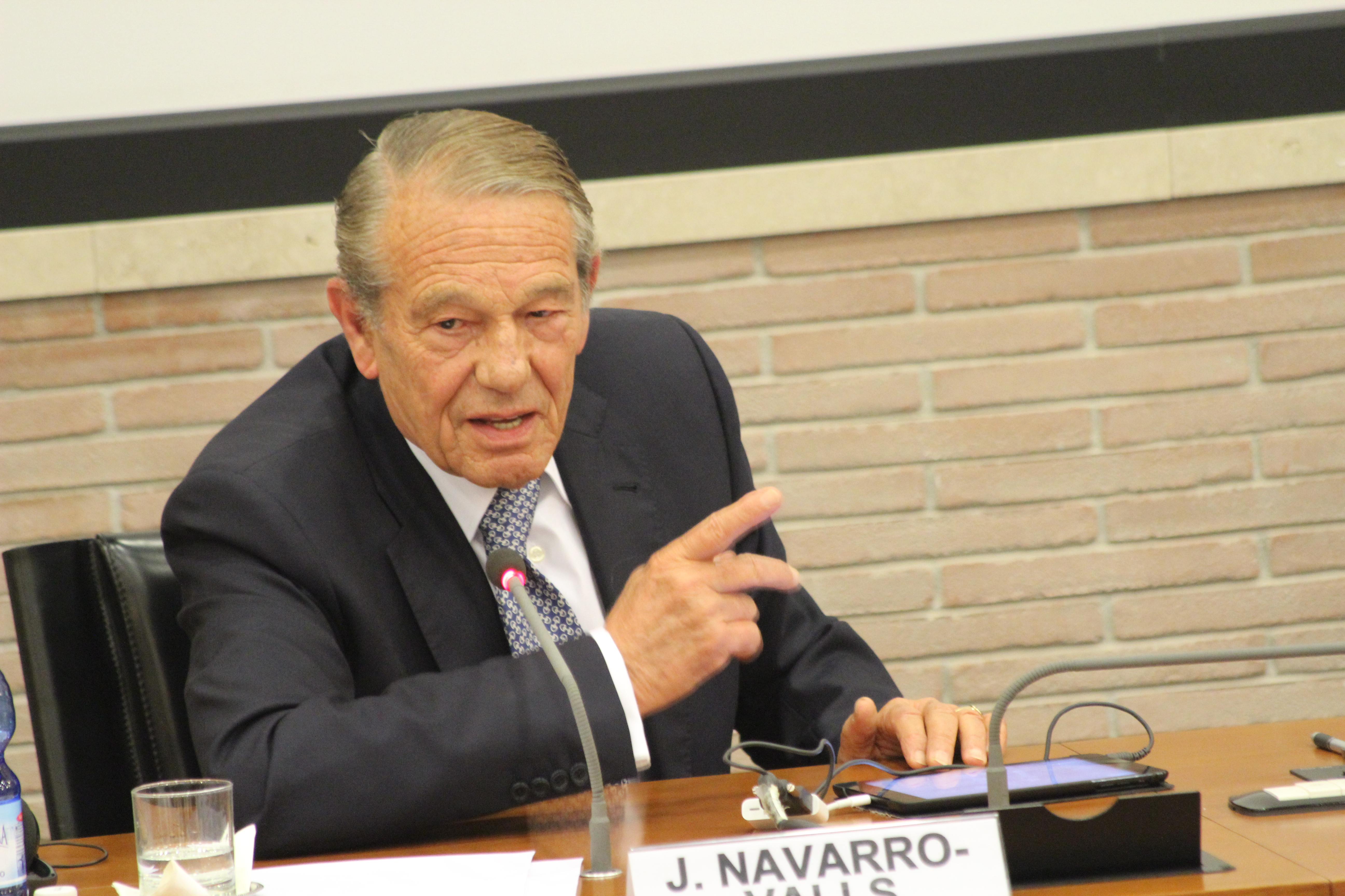 Joaquín Navarro Valls es un periodista que fue portavoz del Vaticano.